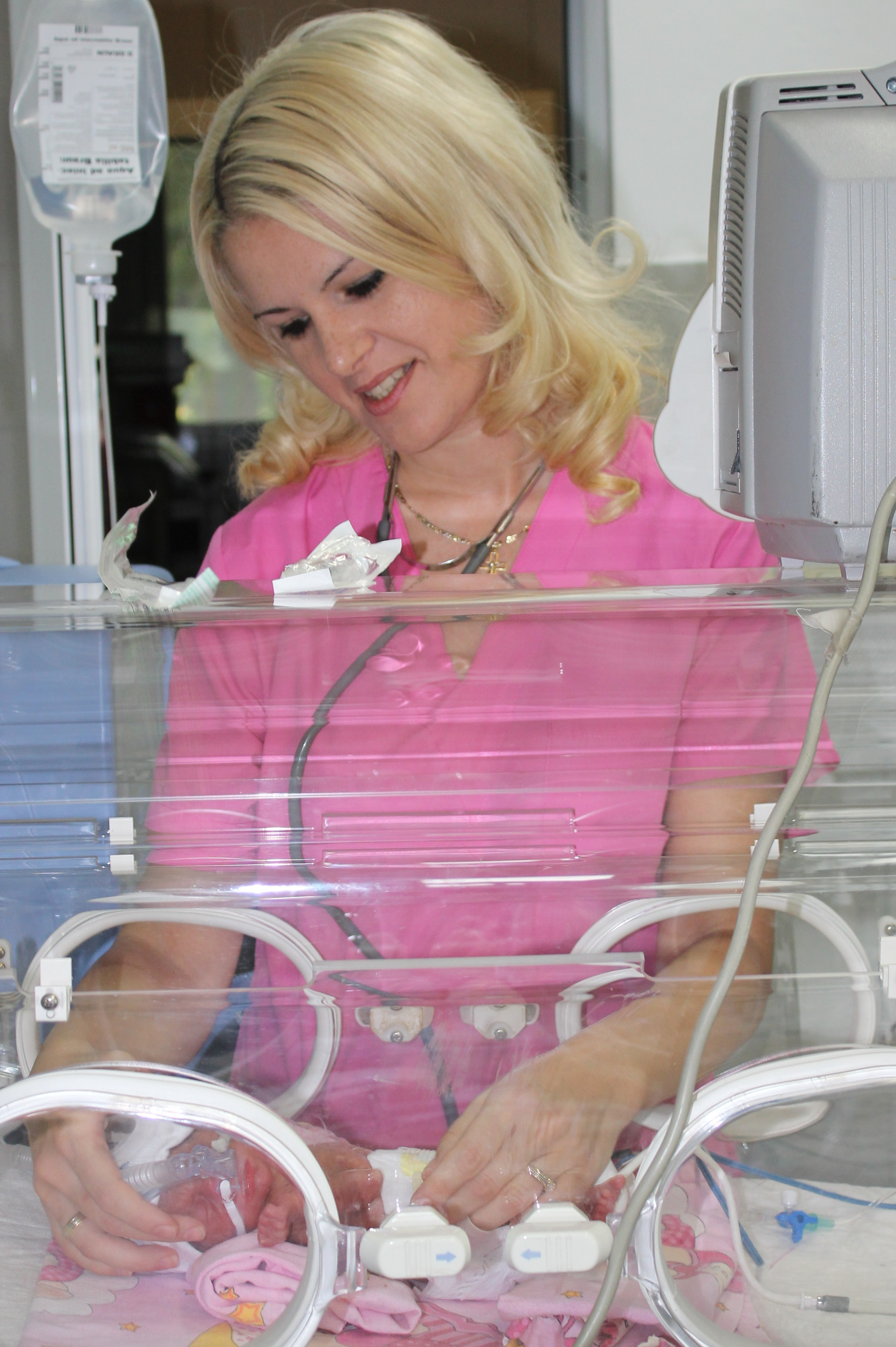 Neonatology- Sheynovo-Hospital